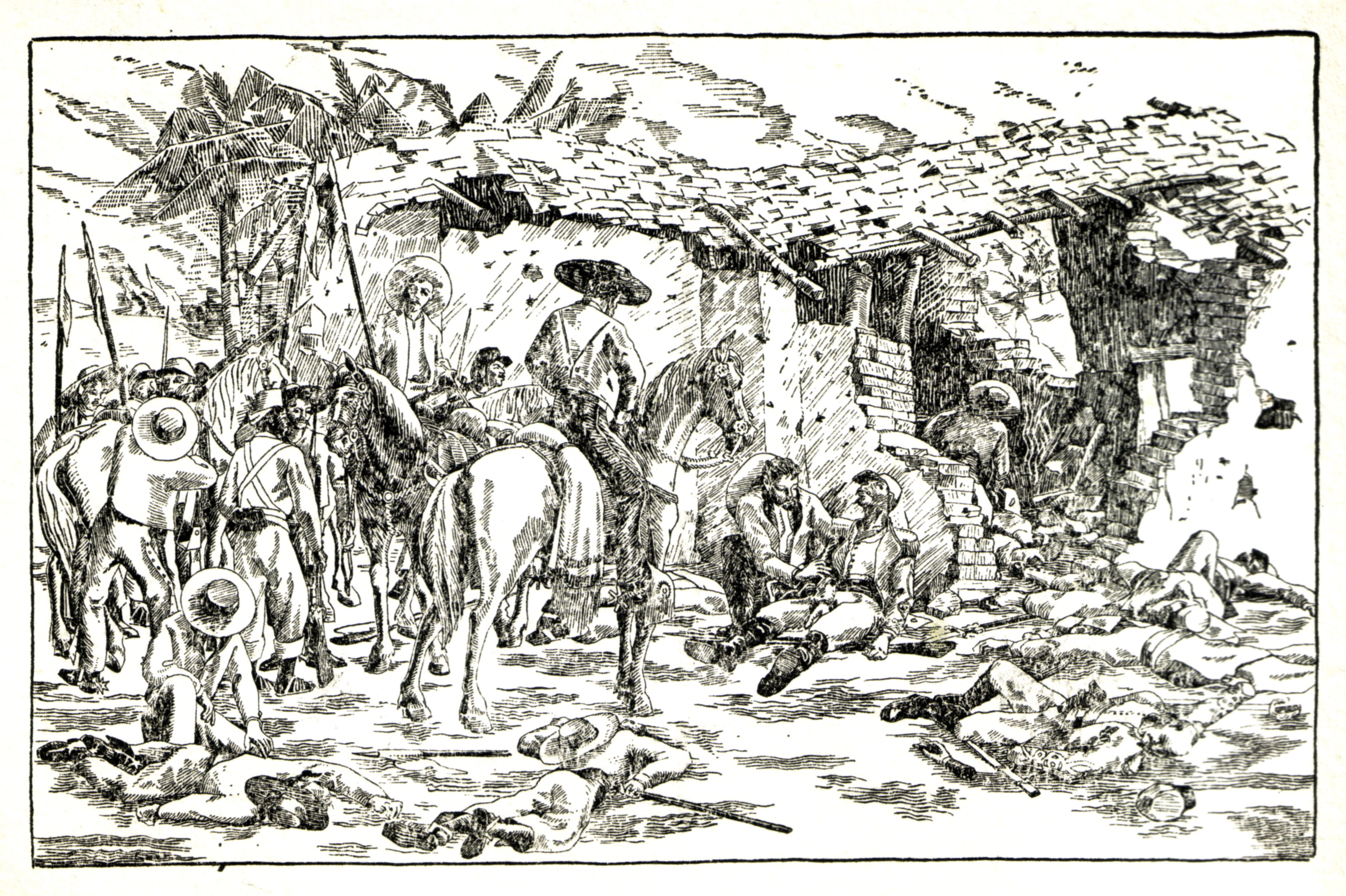 Carte postale de la fin du XIXe siècle figurant les soldats mexicains relevant les légionnaires blessés à l'issue du combat le Camerone le 30 avril 1863